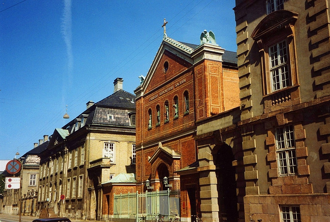 Sankt Ansgar Kirke (katolsk), Københavns Kommune